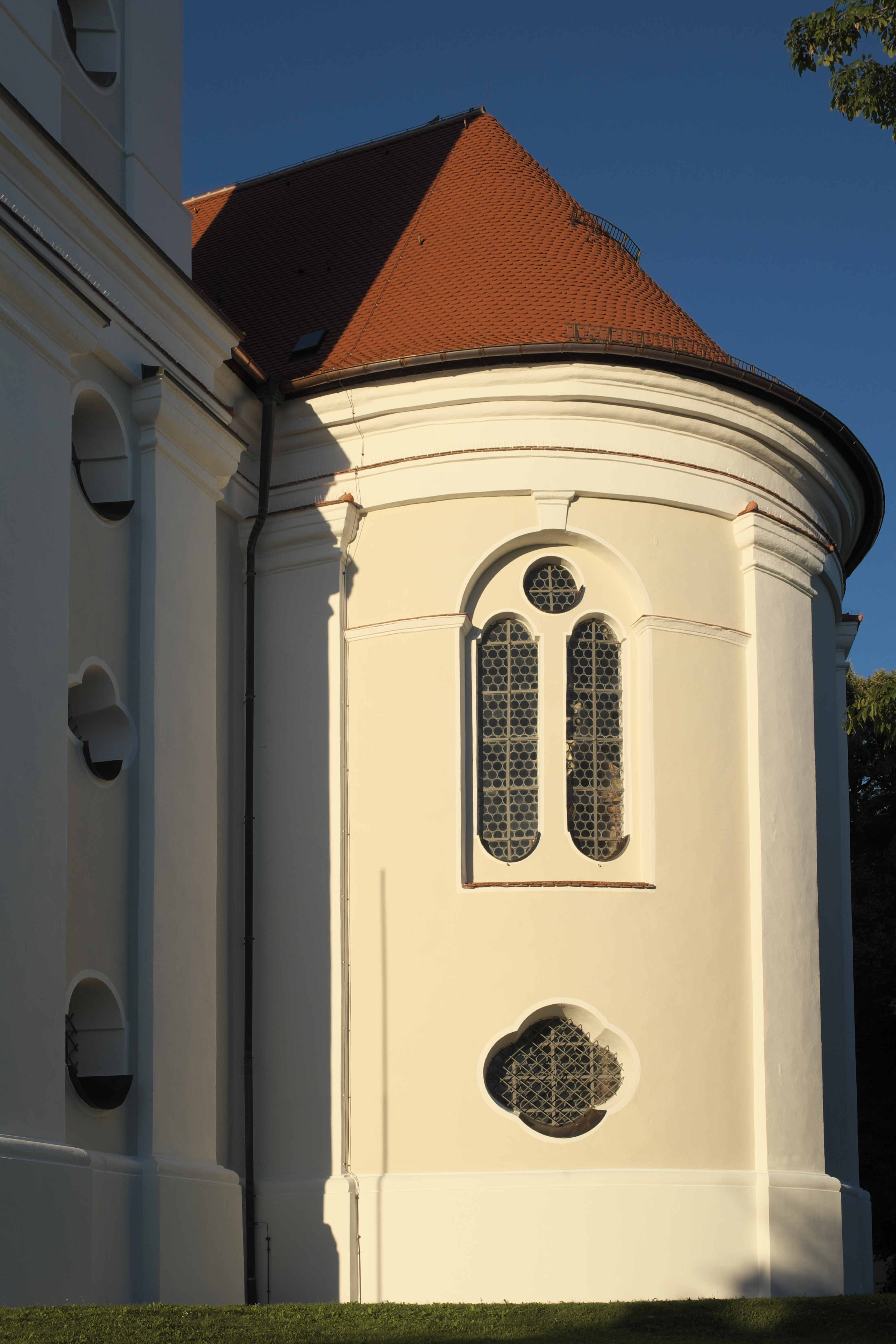 Katholische Wallfahrtskirche Zur Schmerzhaften Muttergottes in Vilgertshofen im Landkreis Landsberg am Lech (Bayern/Deutschland)